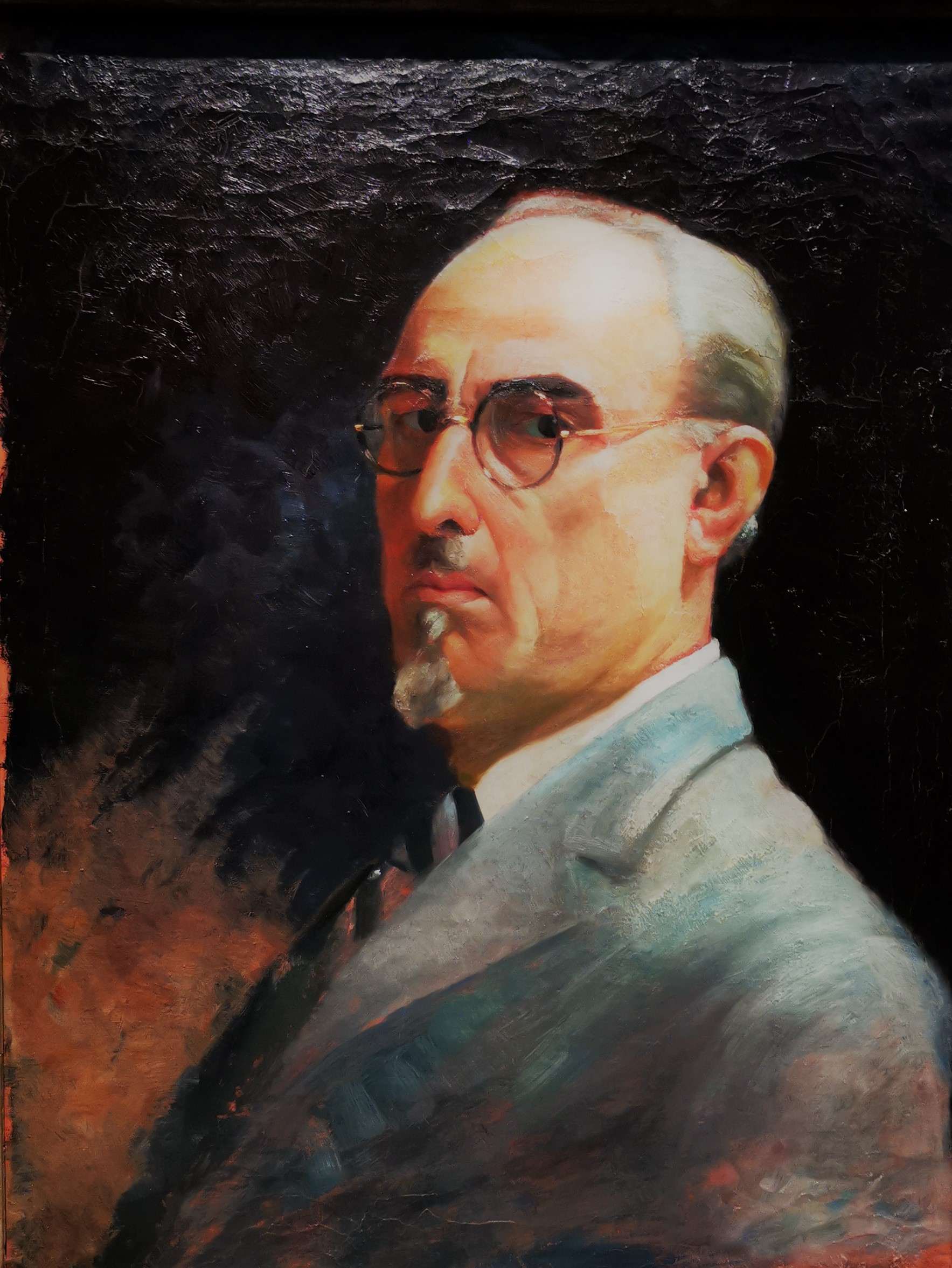 Corneille Lentz, autoportrait. Huile sur toile.